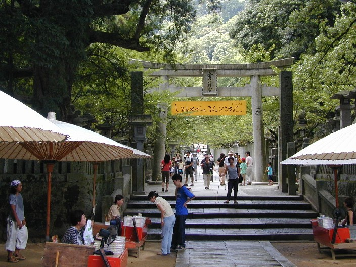 Konpira san, scalinata La foto scattata da me l'11 agosto 2002, nell'isola dello Shikoku (Giappone), mostra la scalinata che porta alla sommità del Konpira san. La località, nei pressi della città di Kotohira è visitata da numerosissimi turisti nella stragrande maggioranza giapponesi. Sulla parte destra dello striscione giallo si possono distinguere le sei lettere in hiragana: こ ん ぴ ら さ ん ko n pi ra sa n.